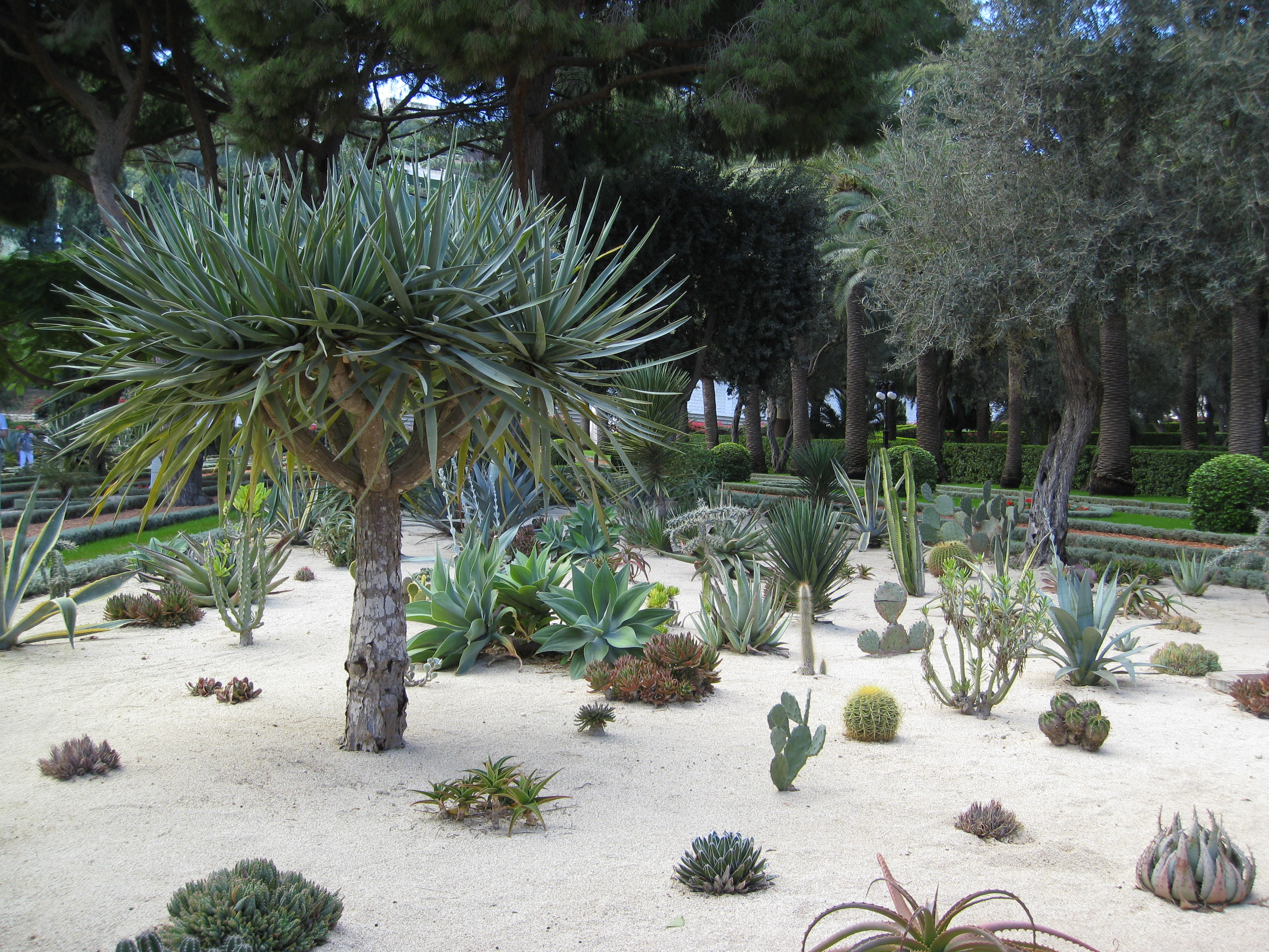 Haifa, Israel